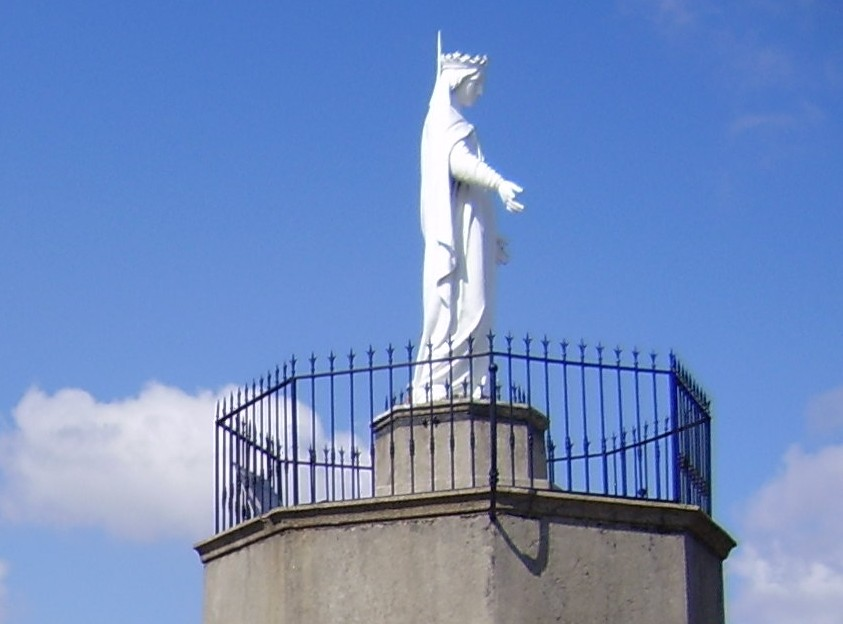 Detail de statue Notre Dame de Miery Upie France Own work/photo personnelle 15 august 2005 Claire Ulrich lieu : upie 26120 drome